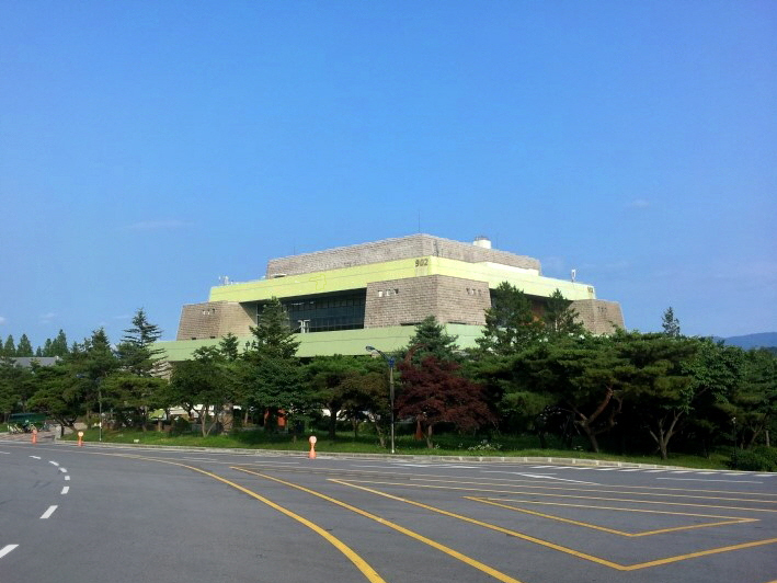 한국어 (조선): 중앙대학교 중앙도서관